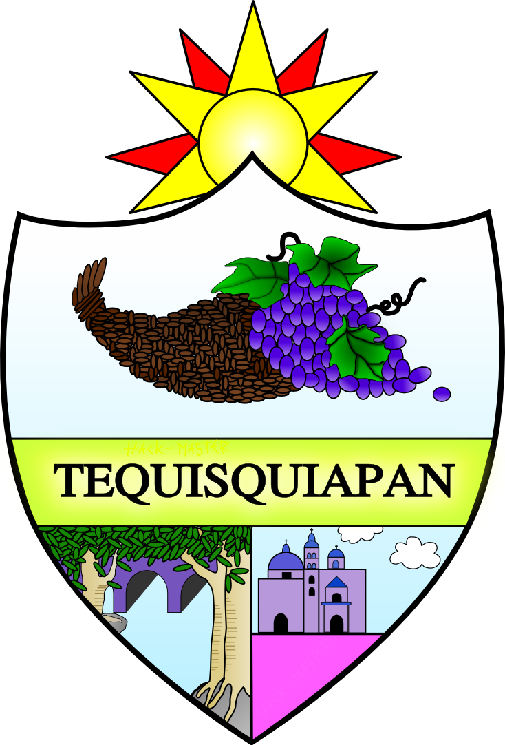 Escudo de Tequisquiapan, diseñado con el Software Libre de diseño vectorial Inkscape sobre un sistema operativo GNU/Linux.